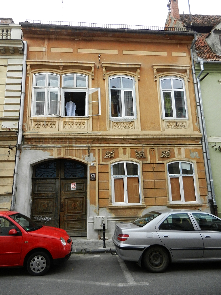 Casă monument istoric